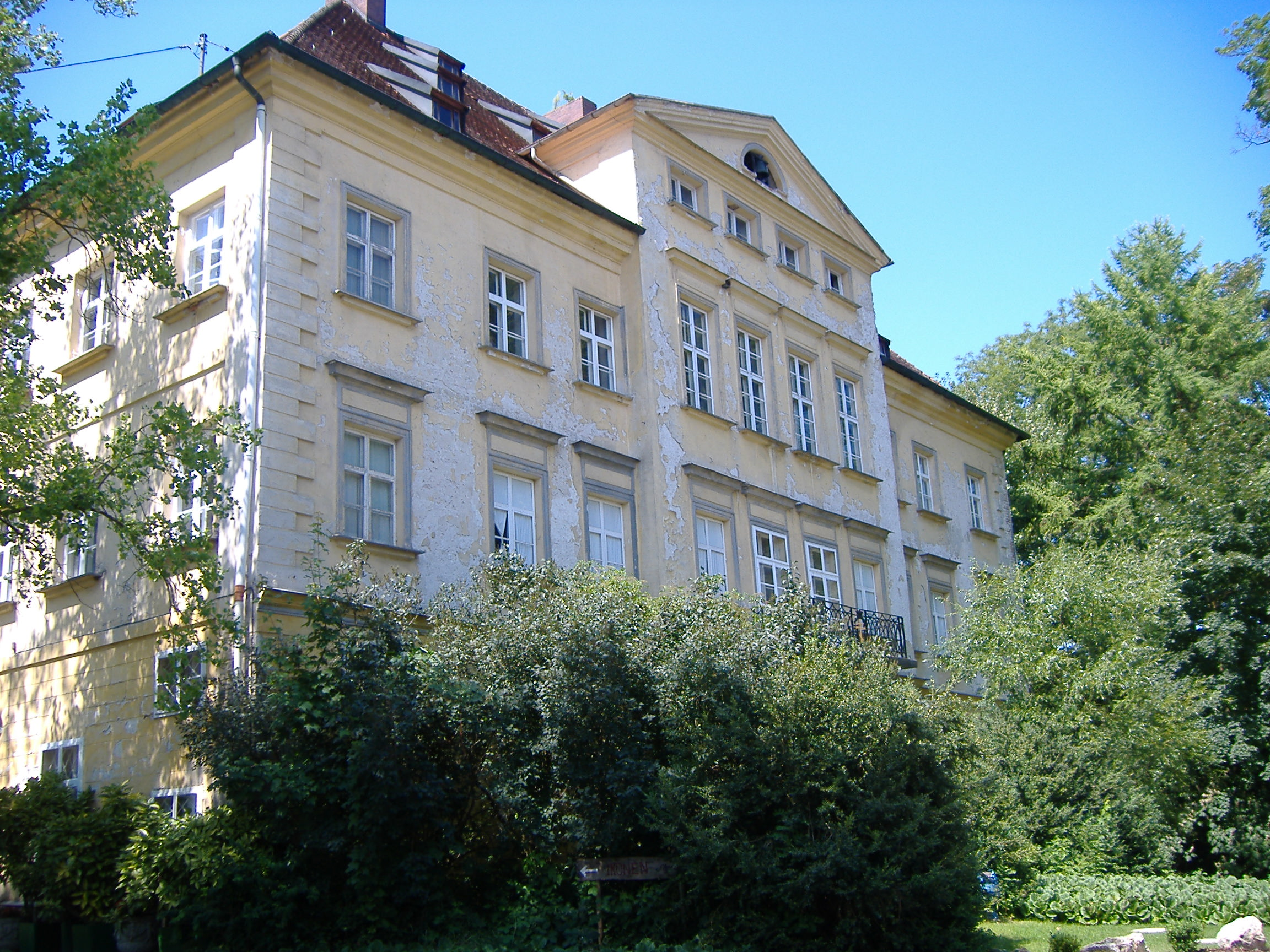 Schlossmauer Autenried